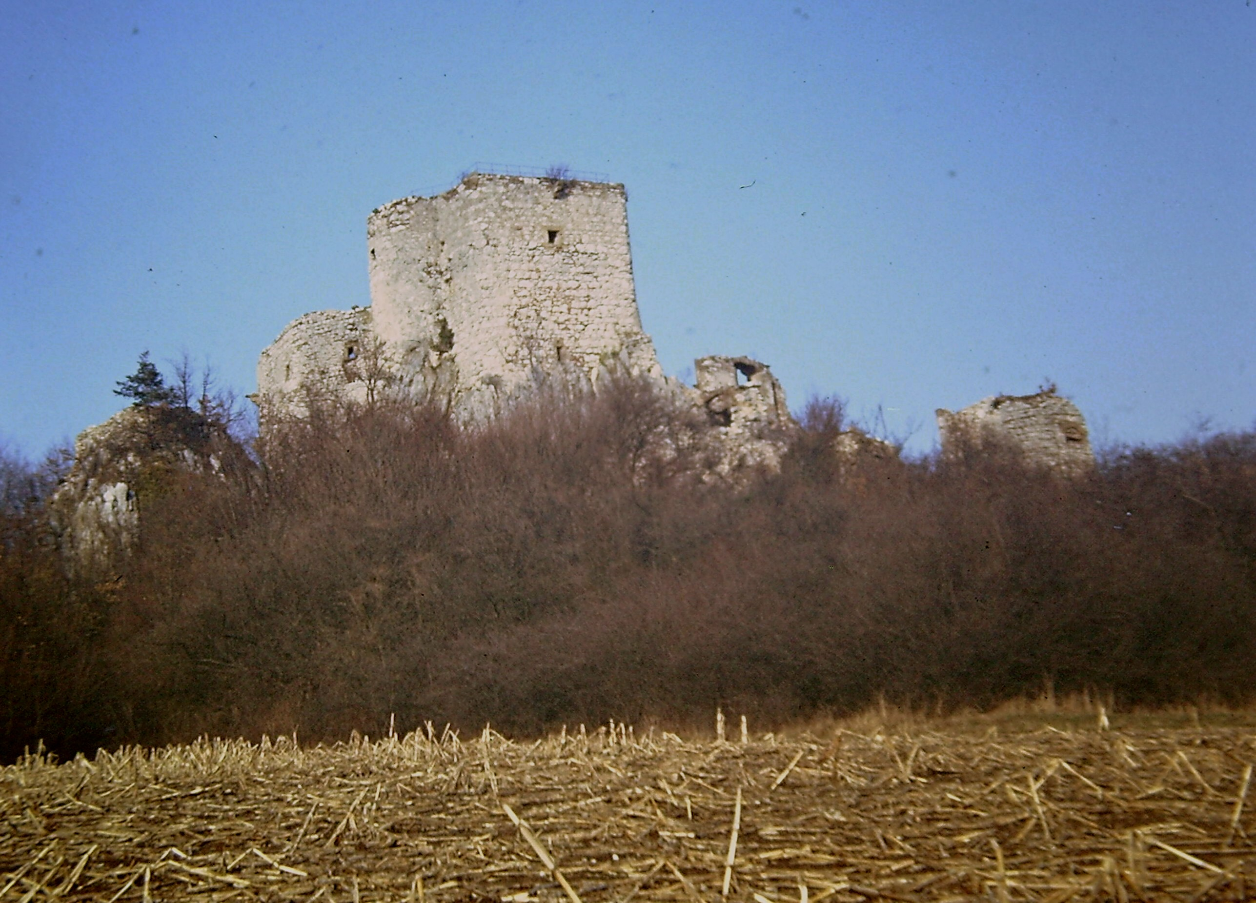 Vue générale